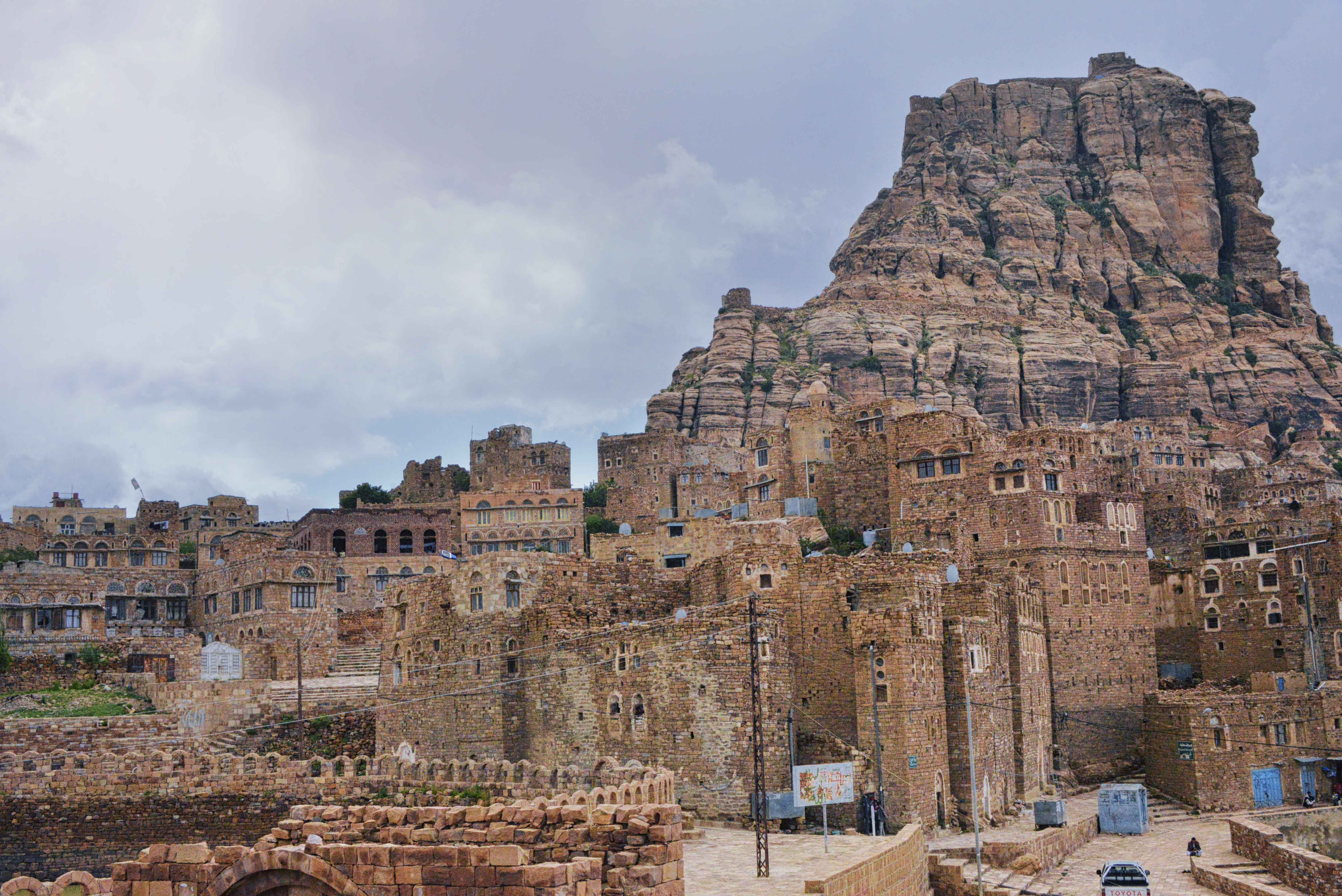 Thula Village, Yemen